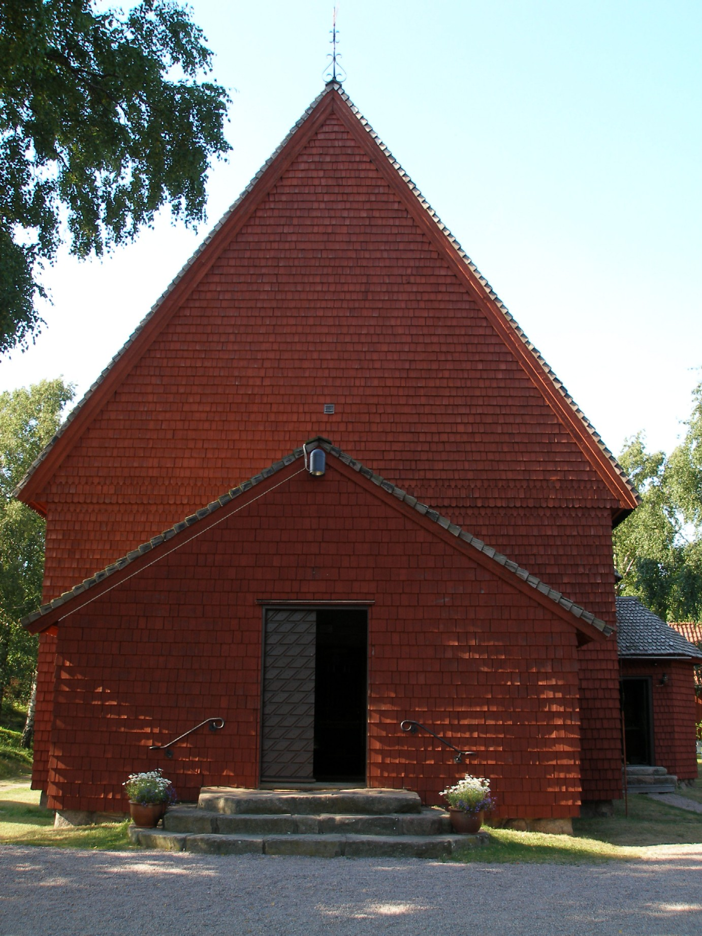 Fotograf: Peter R Peter R 4 september 2006 kl. 20.01 (CEST)